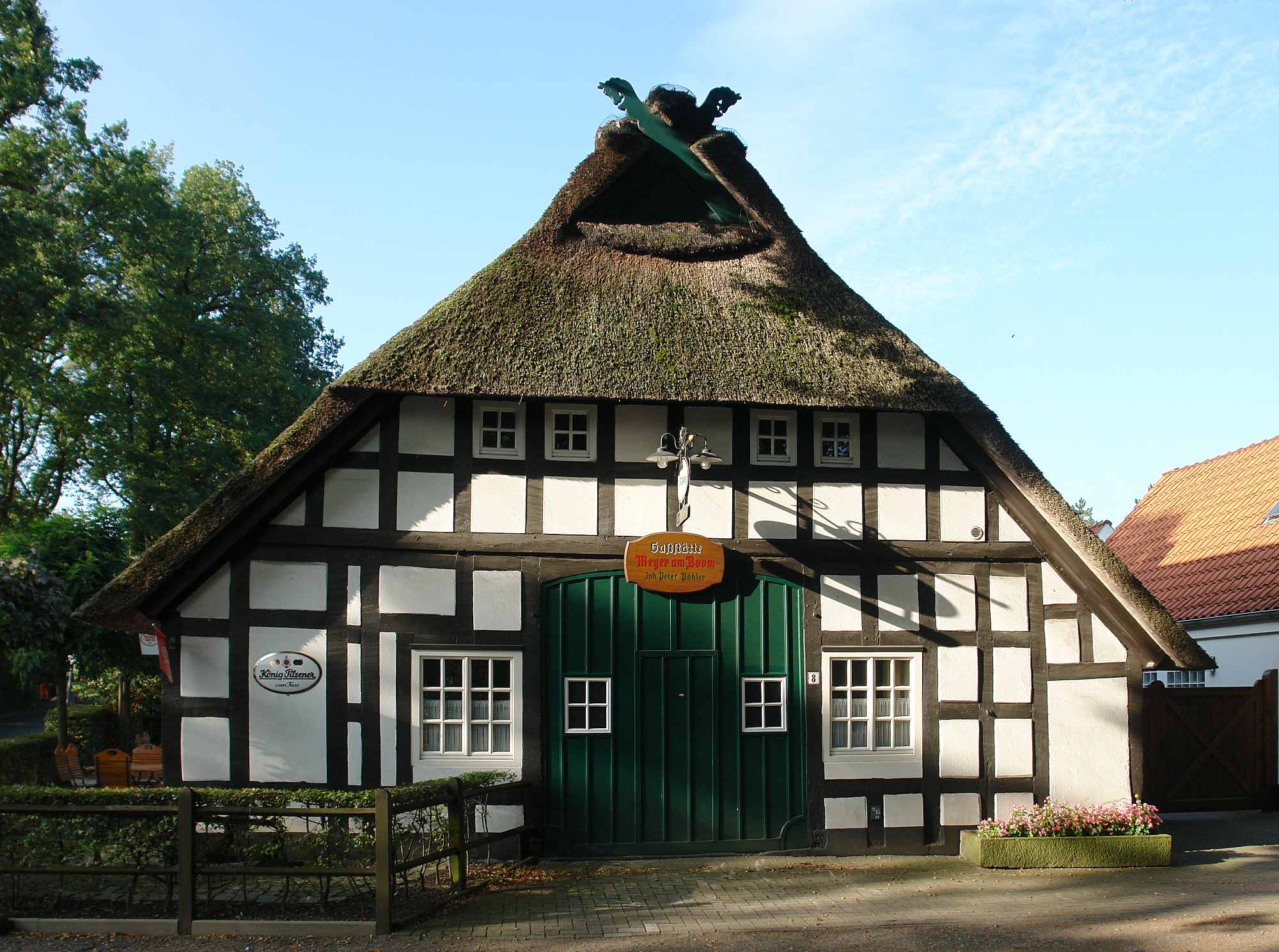 Gaststätte "Meyer am Boom" in Bremen, Oberneulander Landstraße 8.Das abgebildete Objekt ist ein geschütztes Kulturdenkmal in der Freien Hansestadt Bremen, mit der Nr. 0942 beim Landesamt für Denkmalpflege registriert.